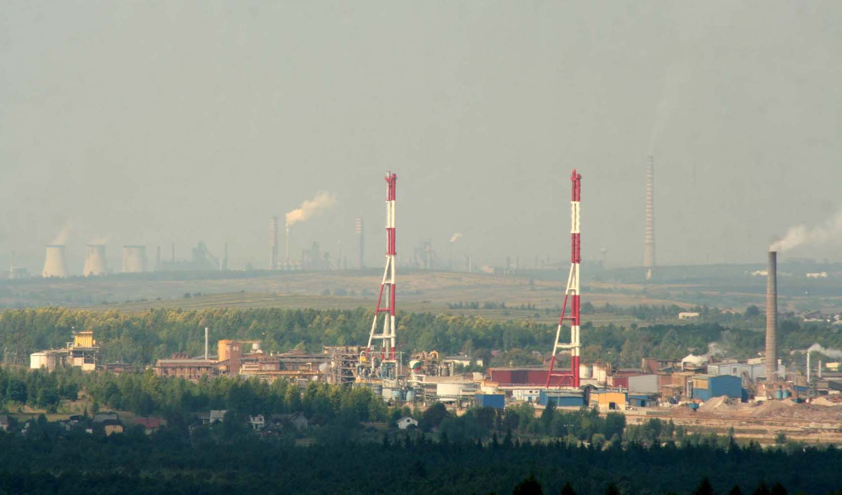 Zakład ZGH w Bukownie koło Olkusza. W tle widok na Zagłębie.